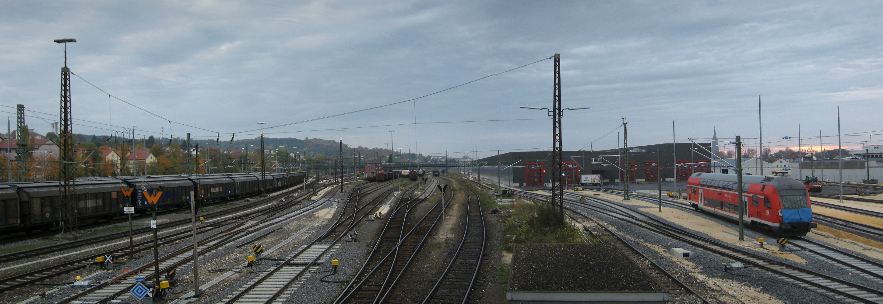 Ulm Rangierbahnhof während der Umbauphase 10/2013 in den frühen Morgenstunden vom ehemaligen Stellwerk 11 aus gesehen